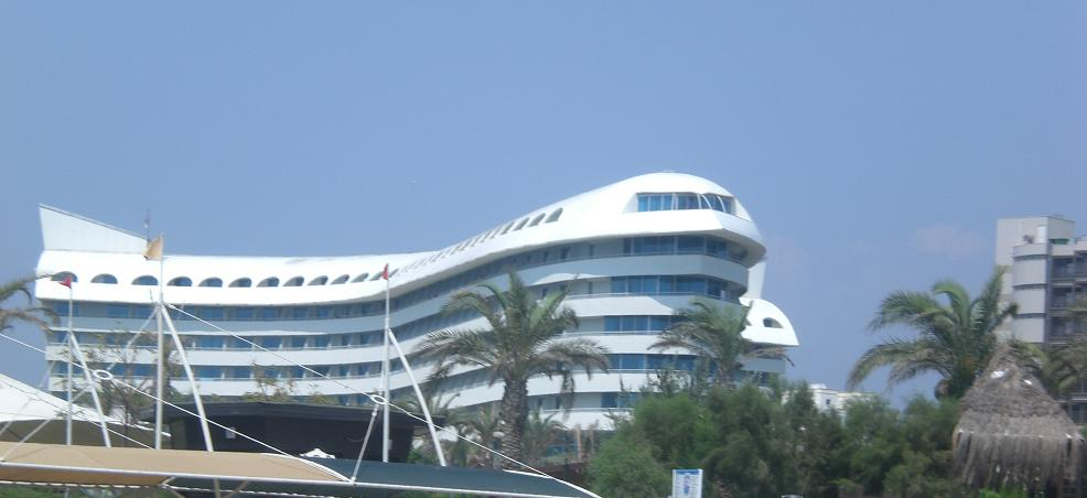 Hotel "Concorde" in Lara (Stadtteil von Antalya) Türkei.